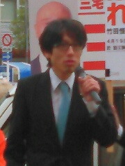 2015年統一地方選挙で応援演説する竹田恒泰氏